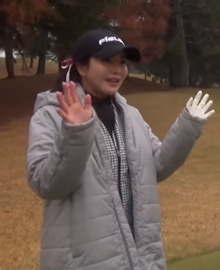 ringolfのYouTube動画に出演するアン・シネ